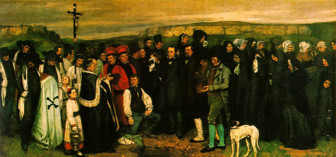 Trauerzug an Grab